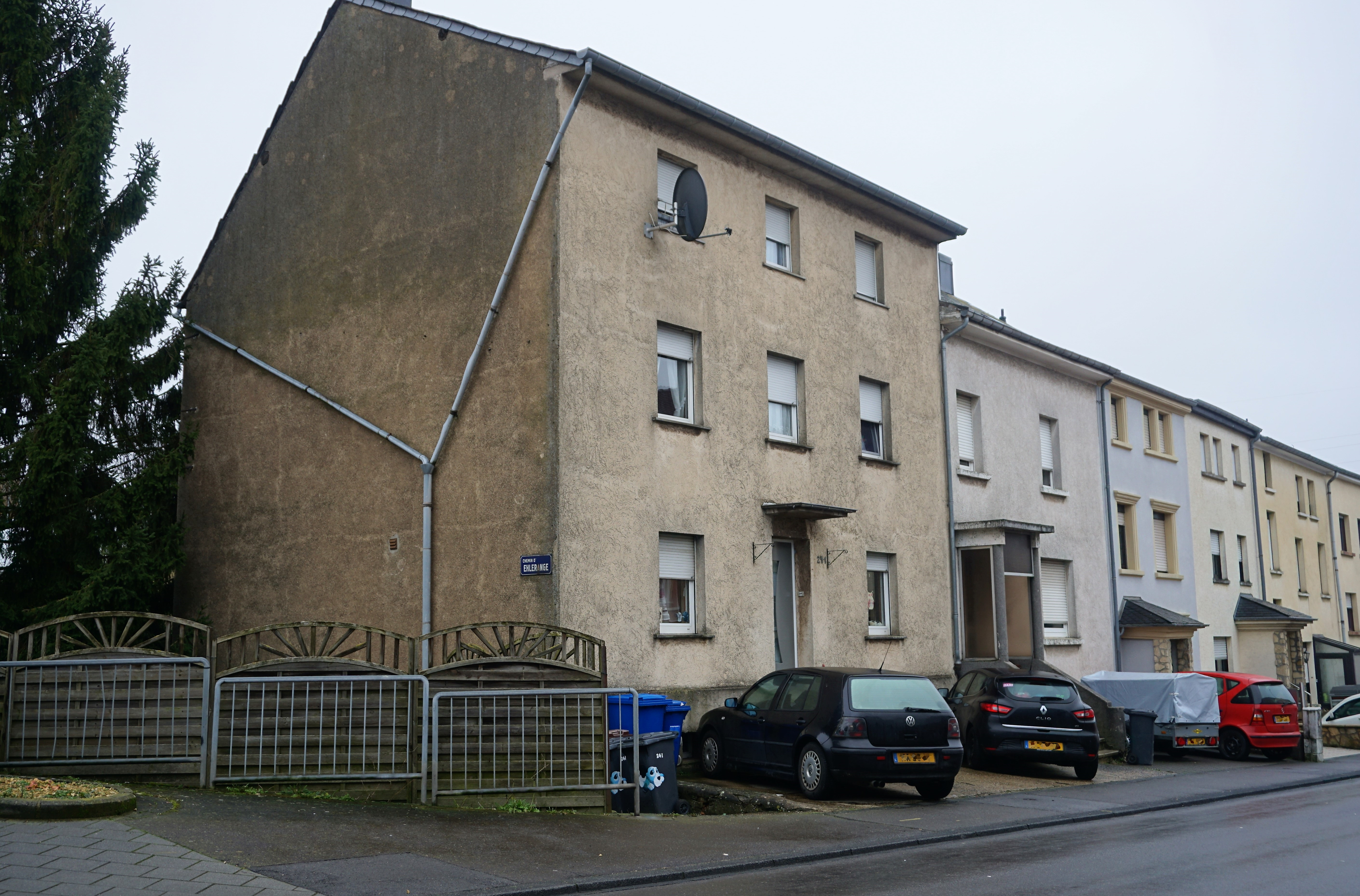 Soleuvre. Maison Kayser, la première maison construite en 1925 au Metzerlach. Coin rue d'Ehlerange / rue de Metzerlach.